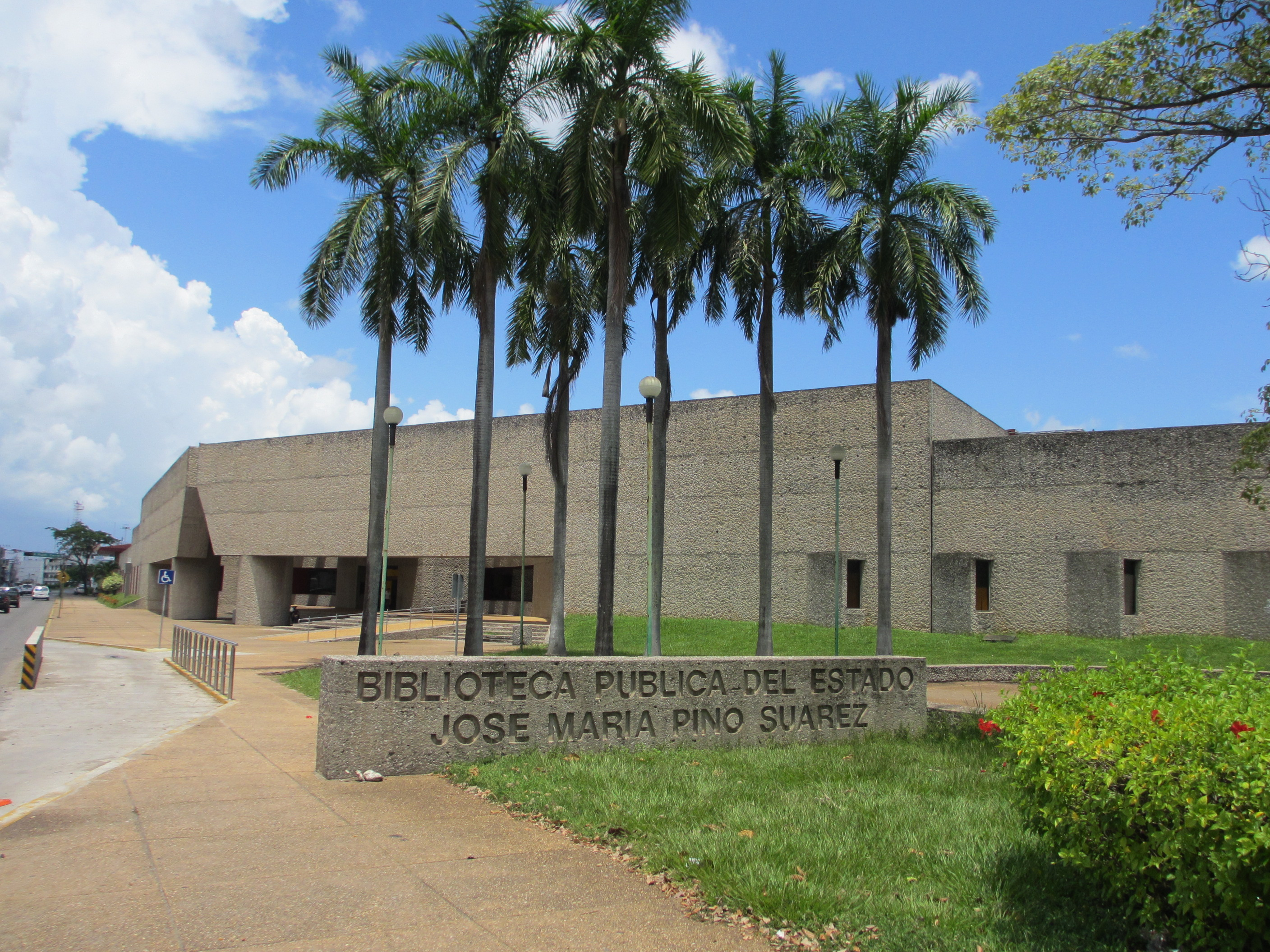 Biblioteca pública del estado "José María Pino Suárez",. Inaugurada el 9 de diciembre de 1987 y considerada una de las mejores de América Latina por sus valiosas colecciones y servicios que ofrece. Villahermosa, Tabasco, México.